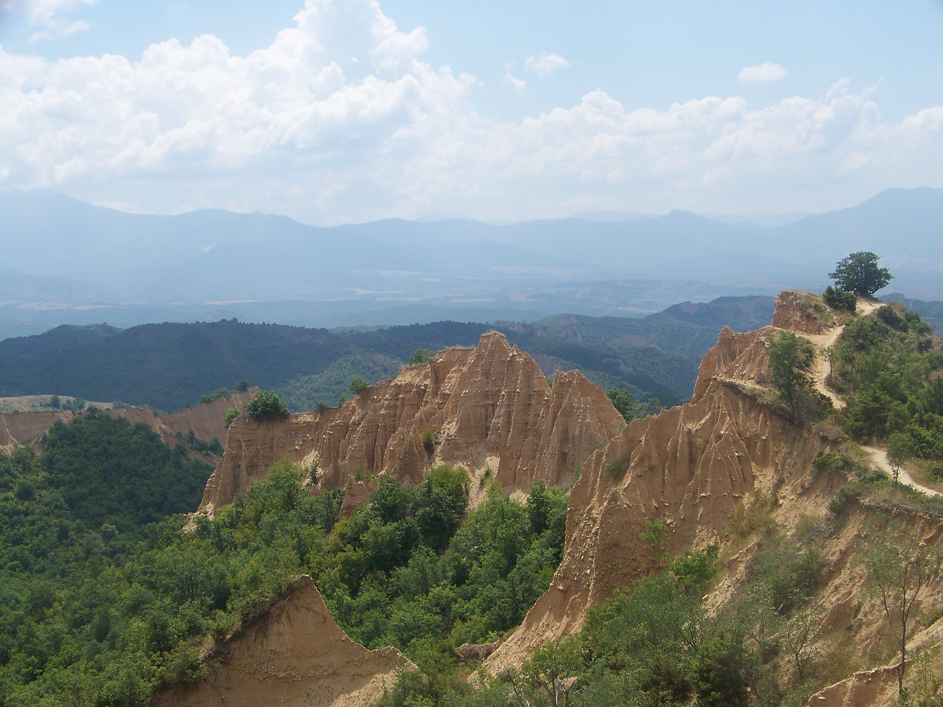 Les «pyramide» de Melnik en Bulgarie.